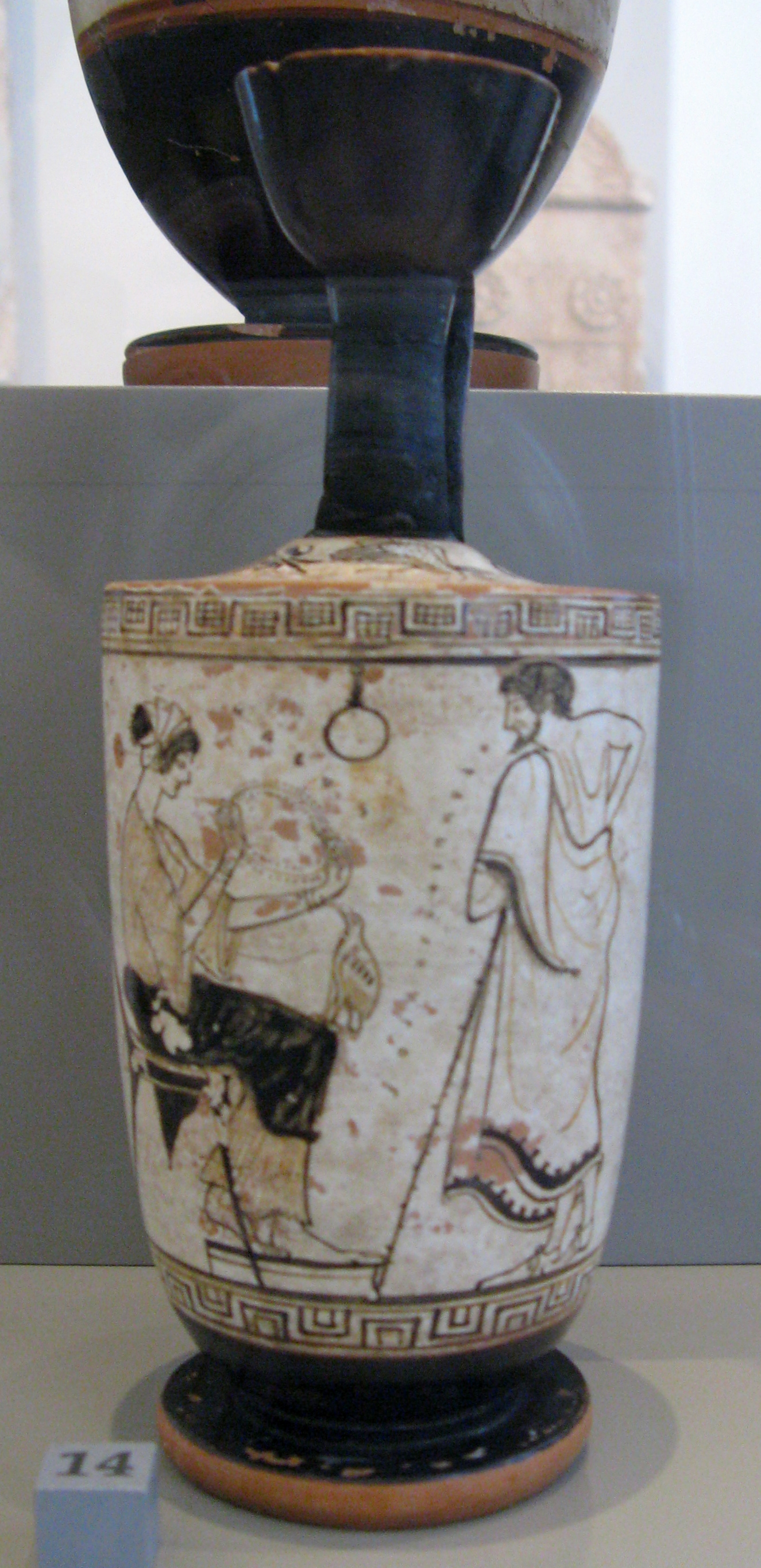 Mann besucht eine Hetäre; Attisch-weißgrundige Lekythos mit der Kalos-Inschrift Olynpichos ist schön des Syriskos-Malers; gefunden 1879 auf dem Kareimeikos in Athen; um 480 v. Chr.; Antikensammlung Berlin, Inventarnummer F 2252